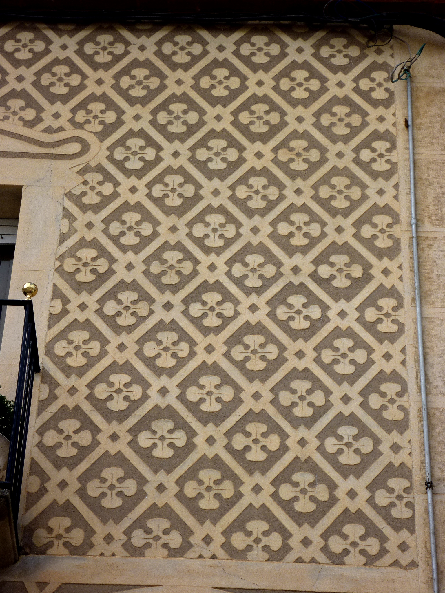 Edifici a la plaça de la Creu, 6 , Cal Caelles (Torà): esgrafiats